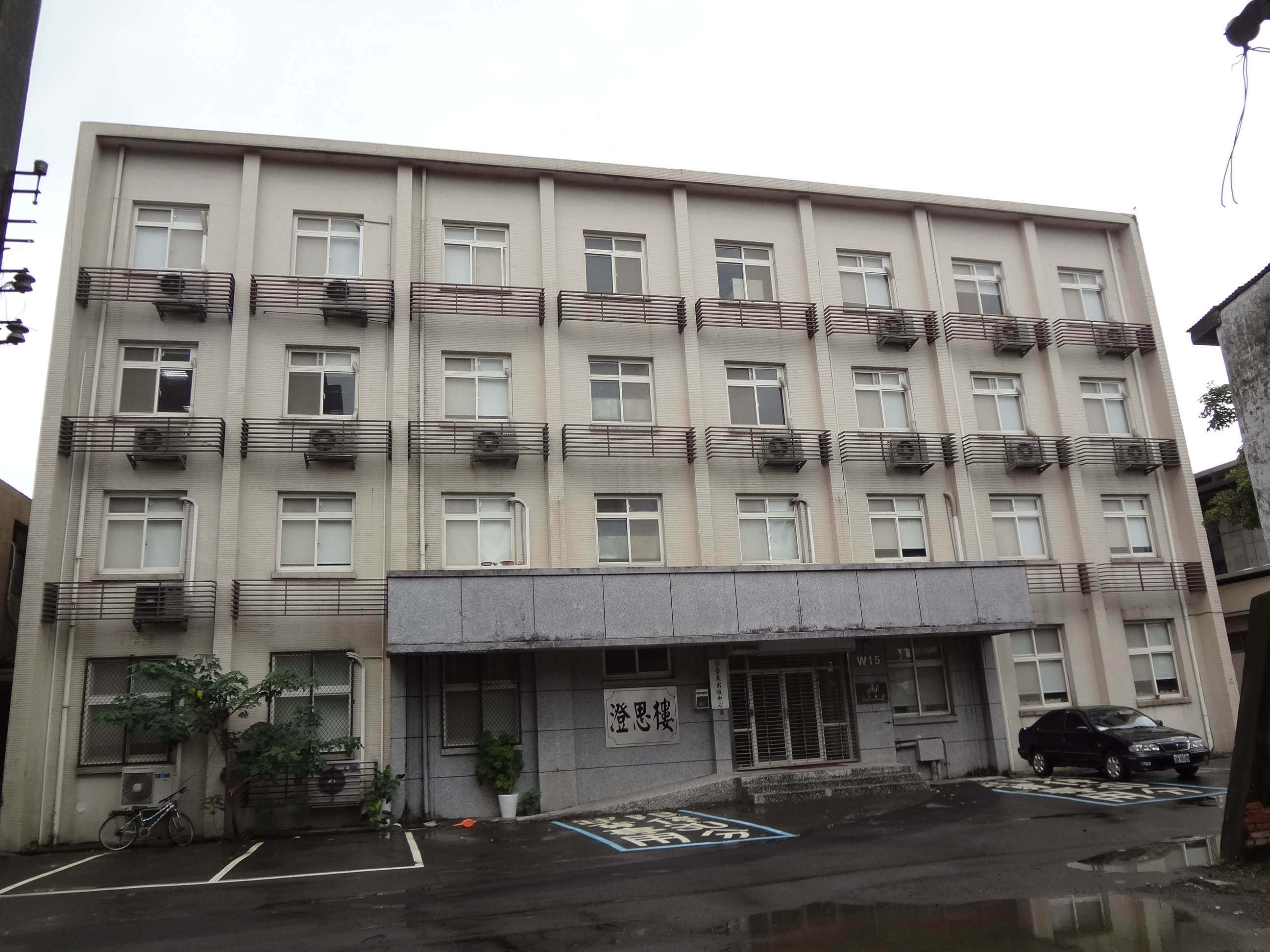 國立臺灣大學水源校區澄思樓。茉莉二手書店思源店設於1樓，國立臺灣大學出版中心設於2樓。